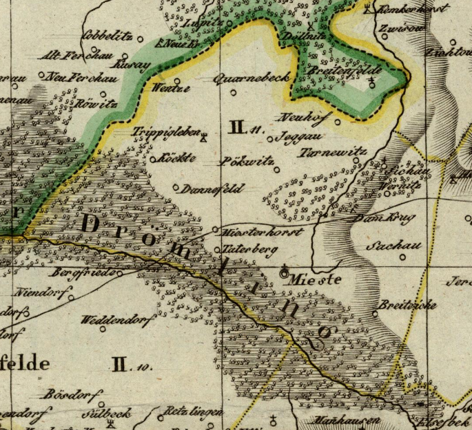 Der Kanton Mieste (1807-13) im Königreich Westphalen